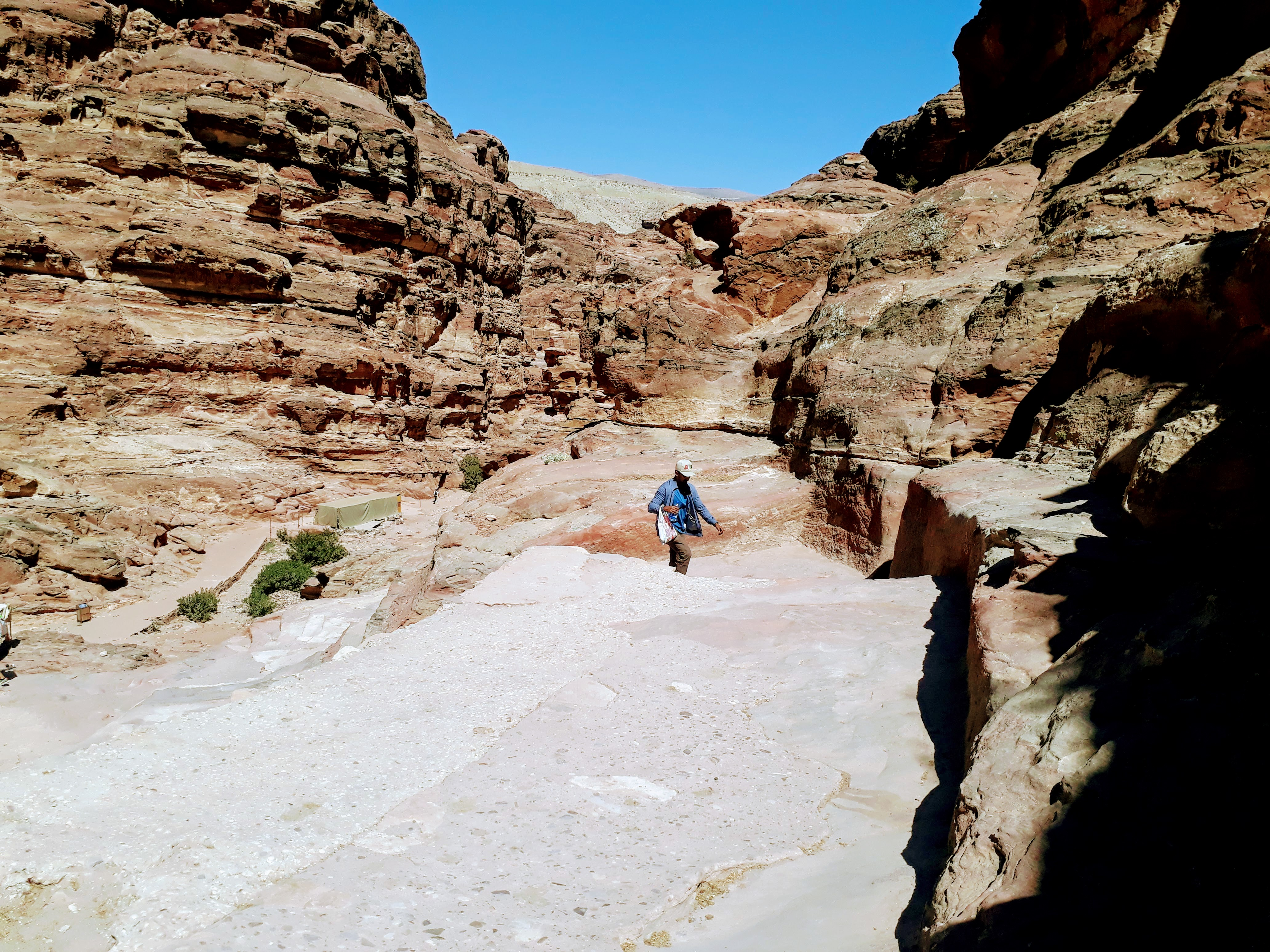 തൊള്ളായിരം പടികൾ ഉള്ള കഠിനമായ കയറ്റത്തിലൂടെ ആസ് ഡയർ എന്ന സ്ഥലത്തേക്ക് ..!